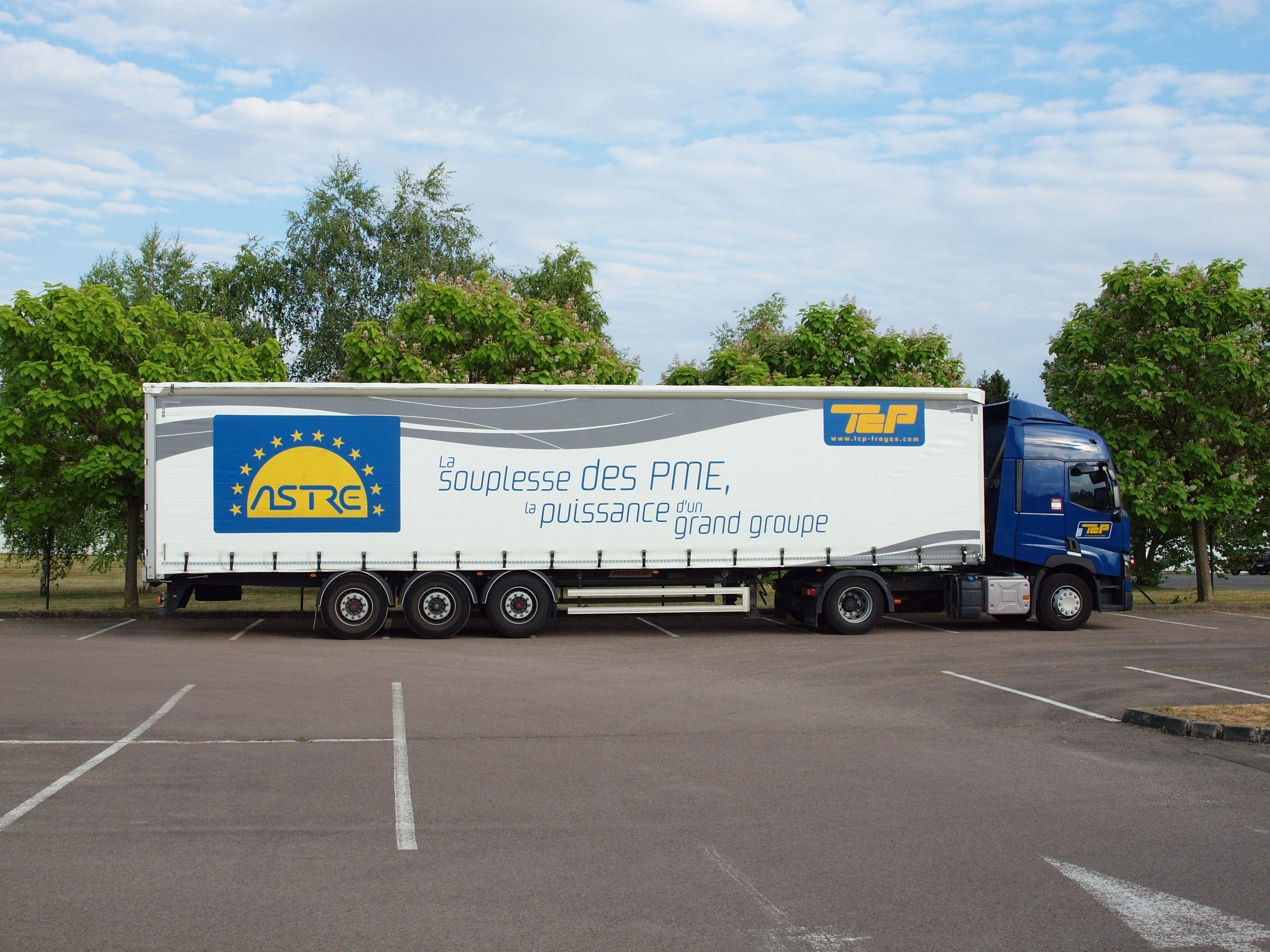 Supermarché ATAC de Pont-sur-Yonne (Yonne, France)